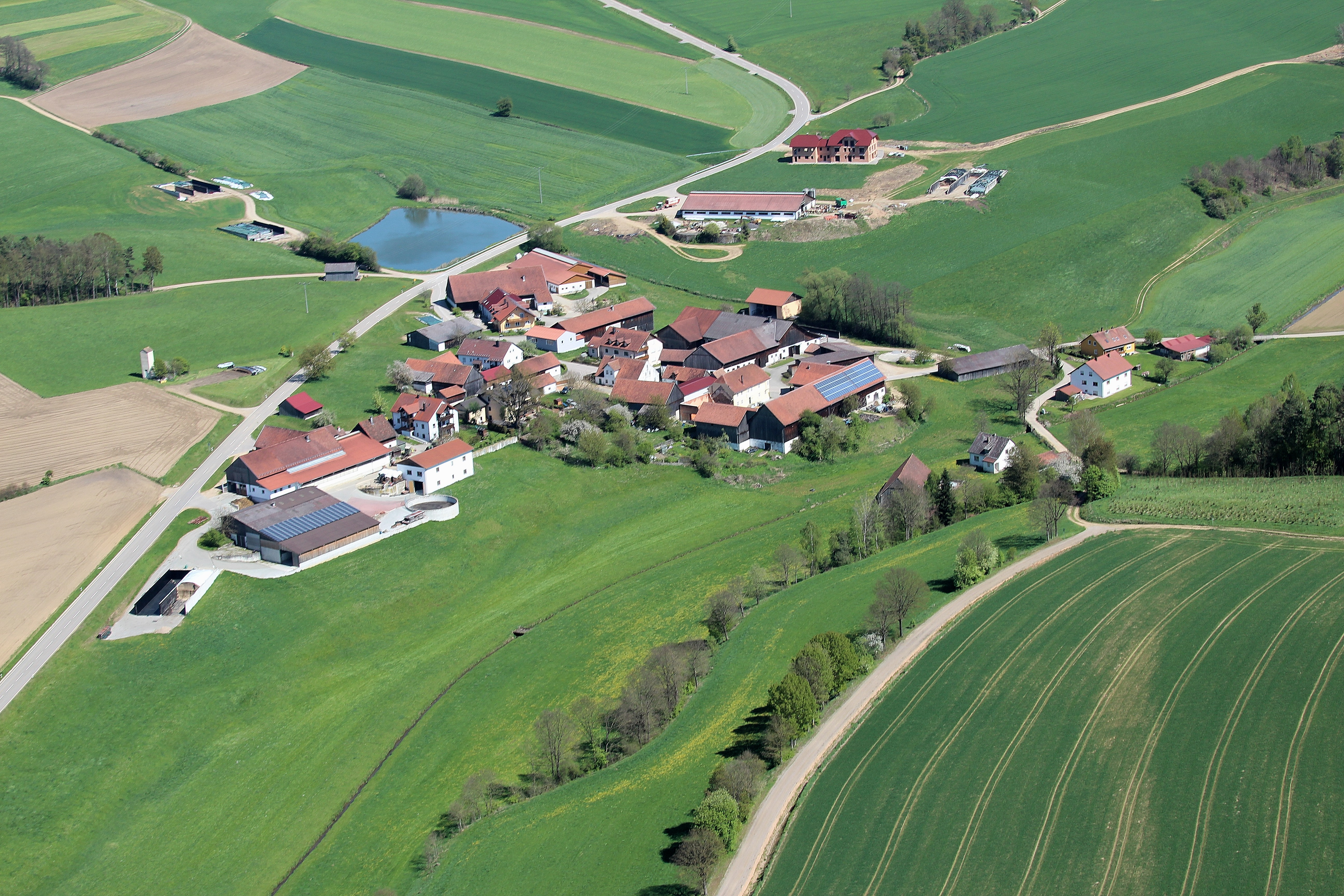 Oberauerbach, Stadt Neunburg vorm Wald, Landkreis Schwandorf, Oberpfalz, Bayern